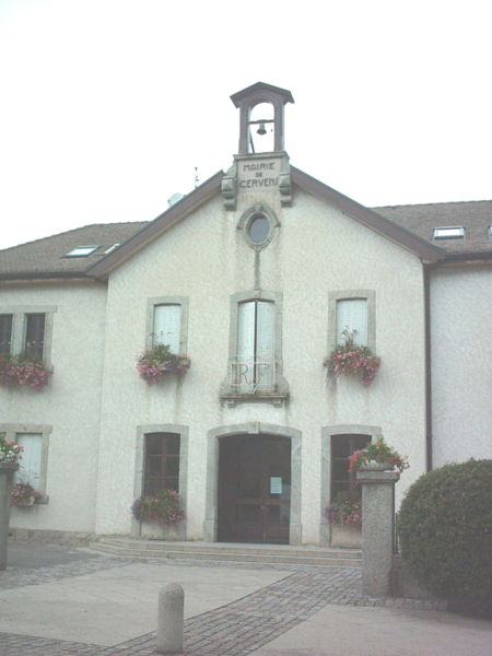 Mairie de Cervens (Haute-Savoie, France)